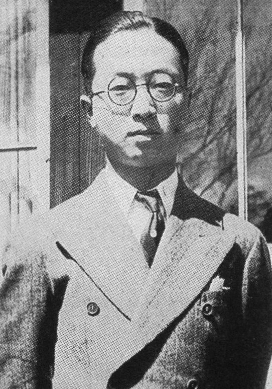 中川良一26歳、誉エンジン設計の前年の撮影。